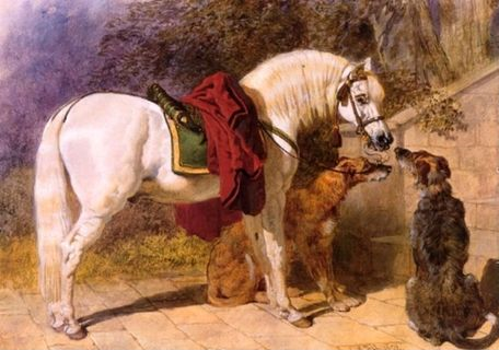 The Squires Pets Arabian and Scottish Deerhounds. John Frederick Herring, Sr. (1795 - 1865) Landscape.